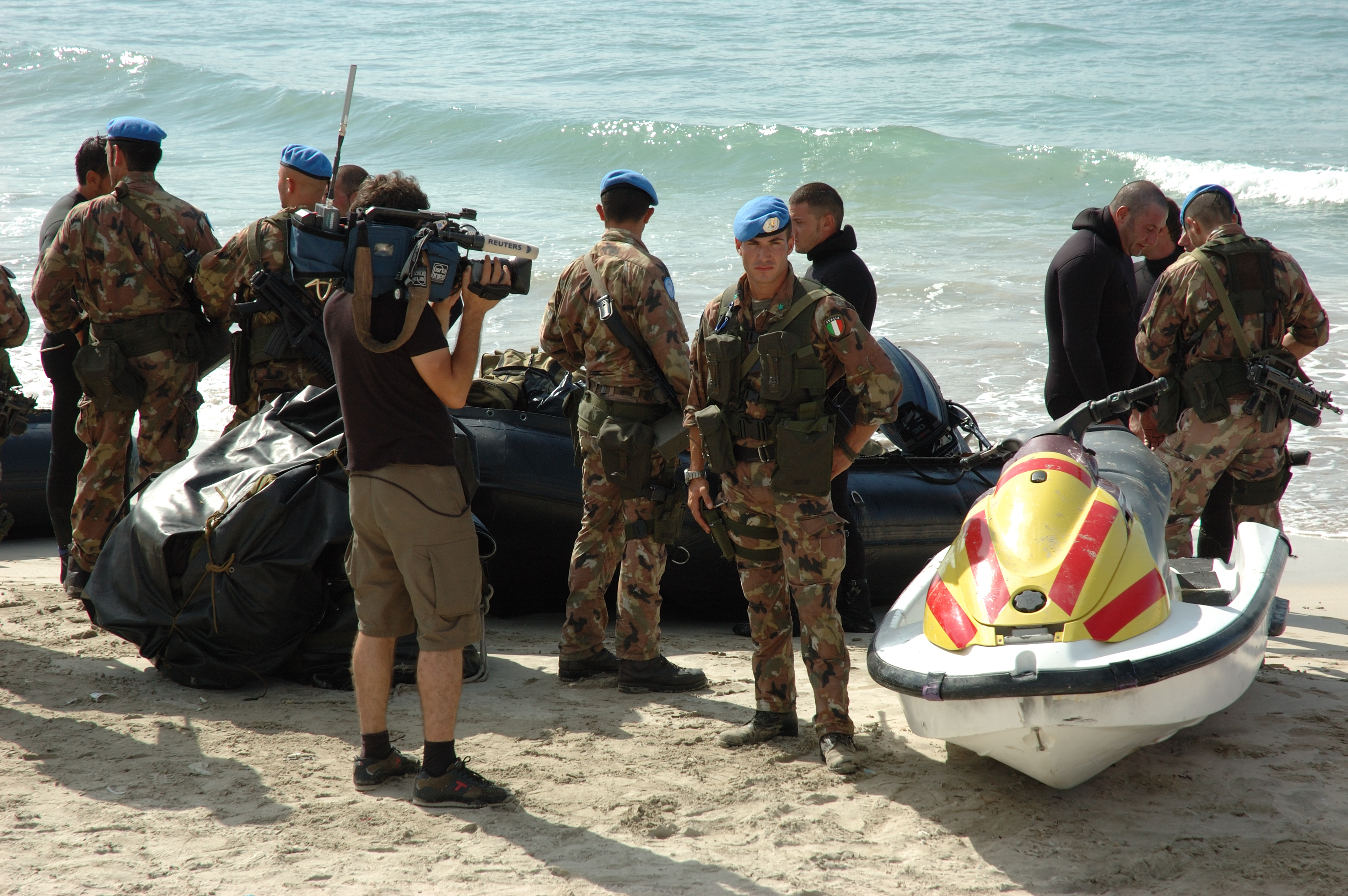 Italian UN marines Lebanon 2006